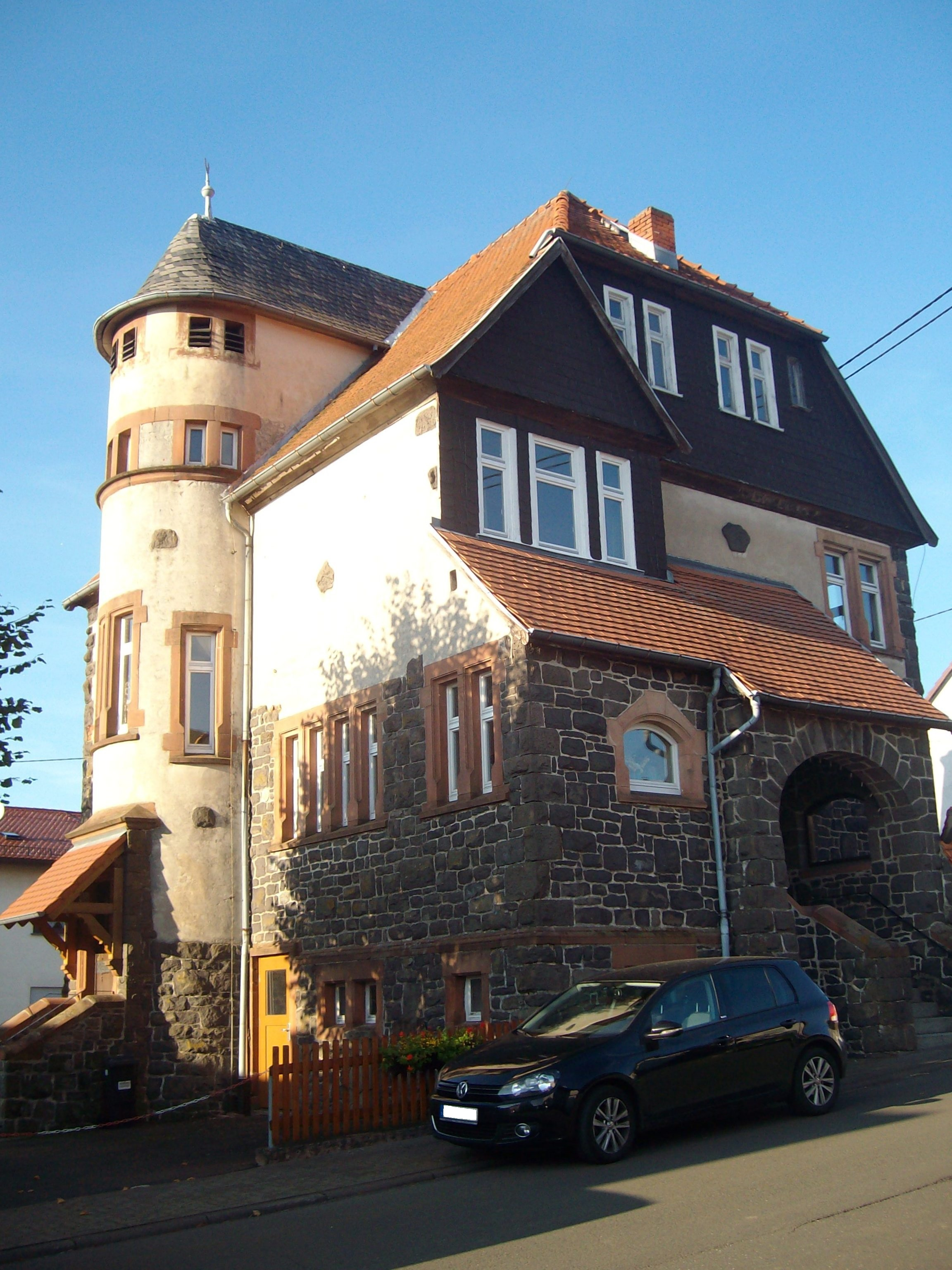 Südseite der Evangelischen Kirche Altenhain, Laubach, Landkreis Gießen, Hessen, Deutschland